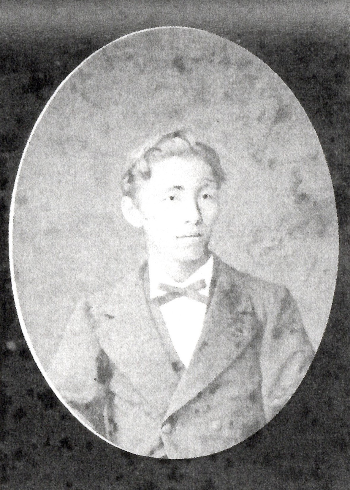 藤井行徳の肖像写真。